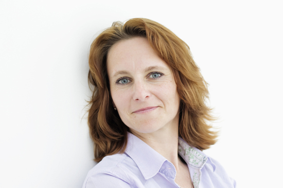 Jana Suchá, poslankyně za VV.